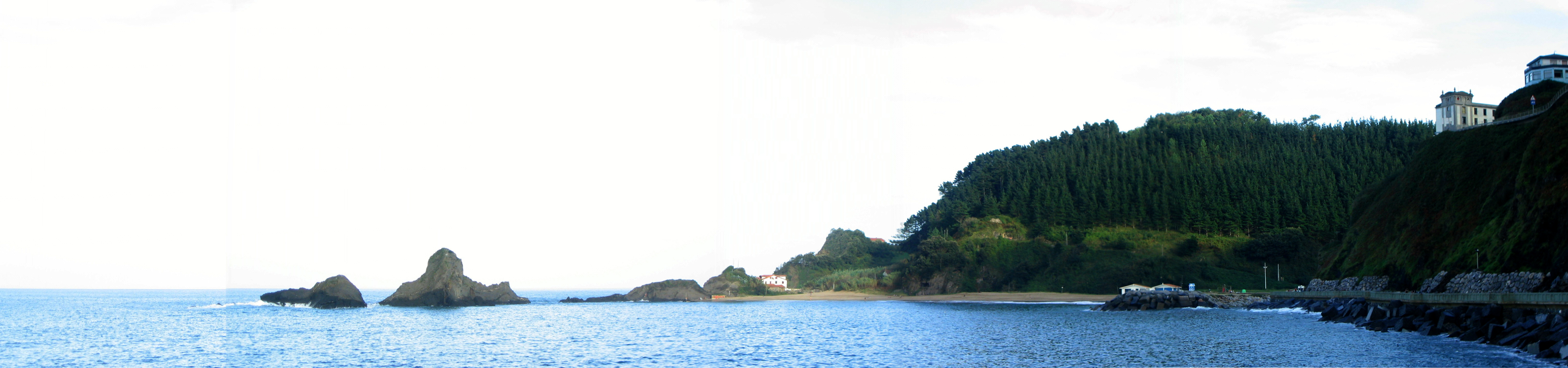 Playa de Saturraran, vista general. Mutriku, Guipúzcoa, País Vaco, España.